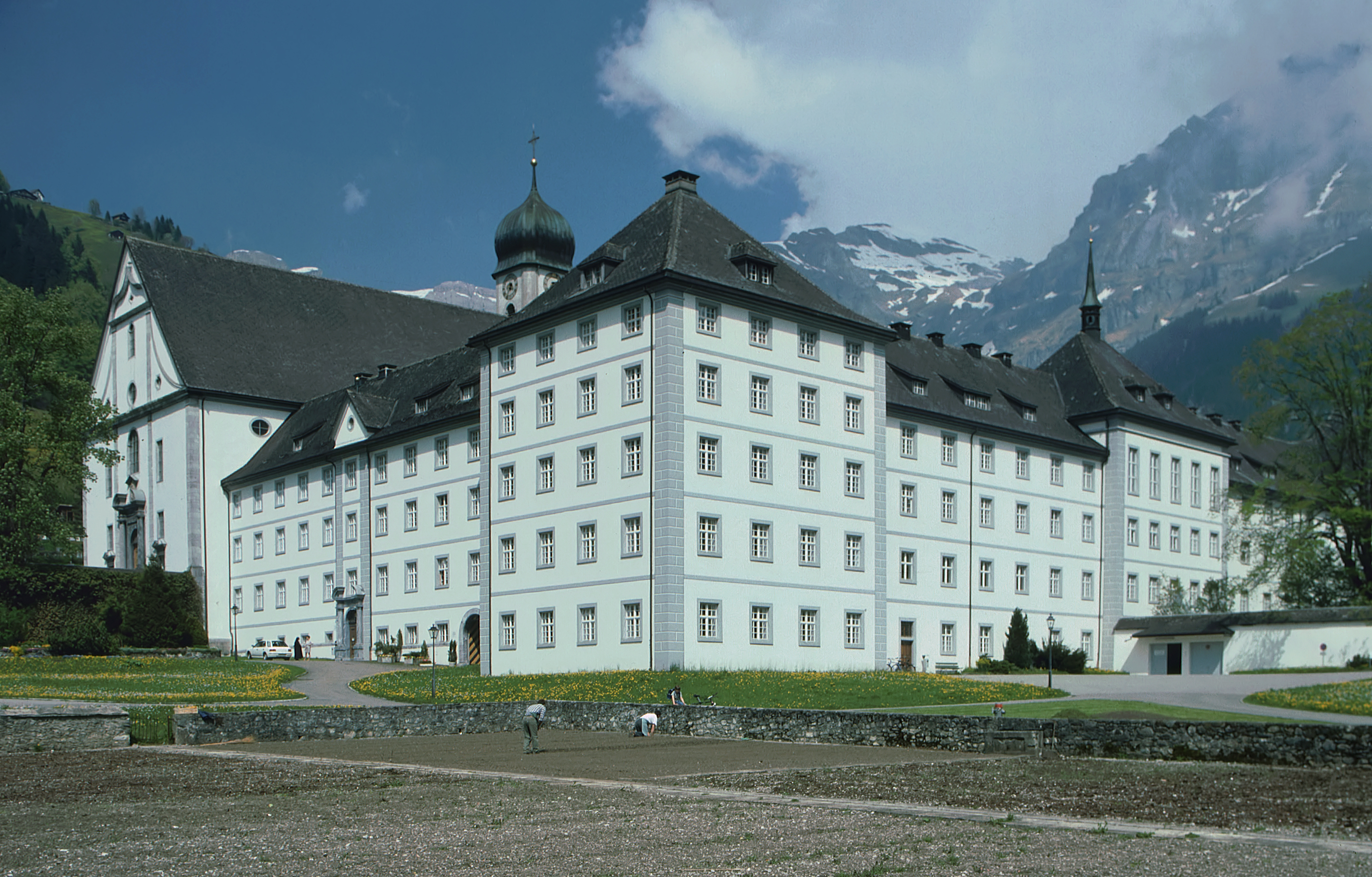 Kloster Engelberg im oberen Engelberger Tal/Zentralschweiz